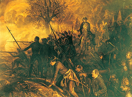 Фридрих и его люди в битве при Хохкирхе